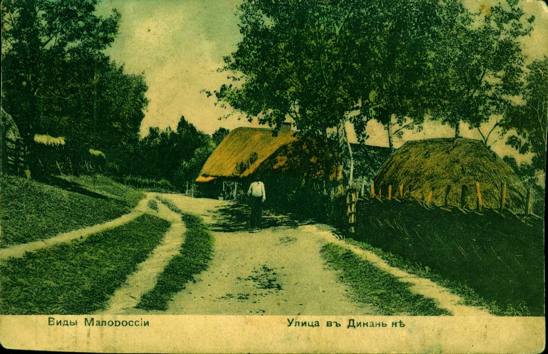 Вулиця у Диканьці Кінець 19 ст. Street in Dykanka. The end of the 19th century. Rue dans Dykanka. La fin du 19ème siècle.